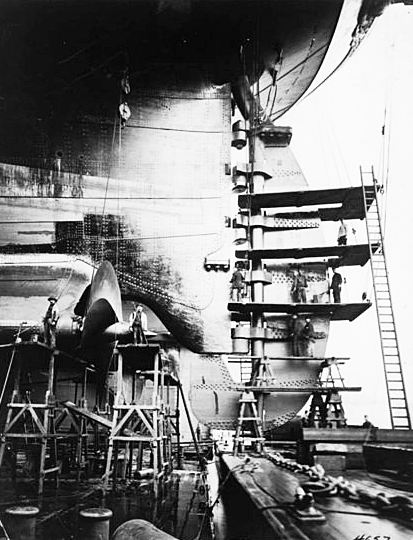 Imperator (Schiff) / ca. 1912